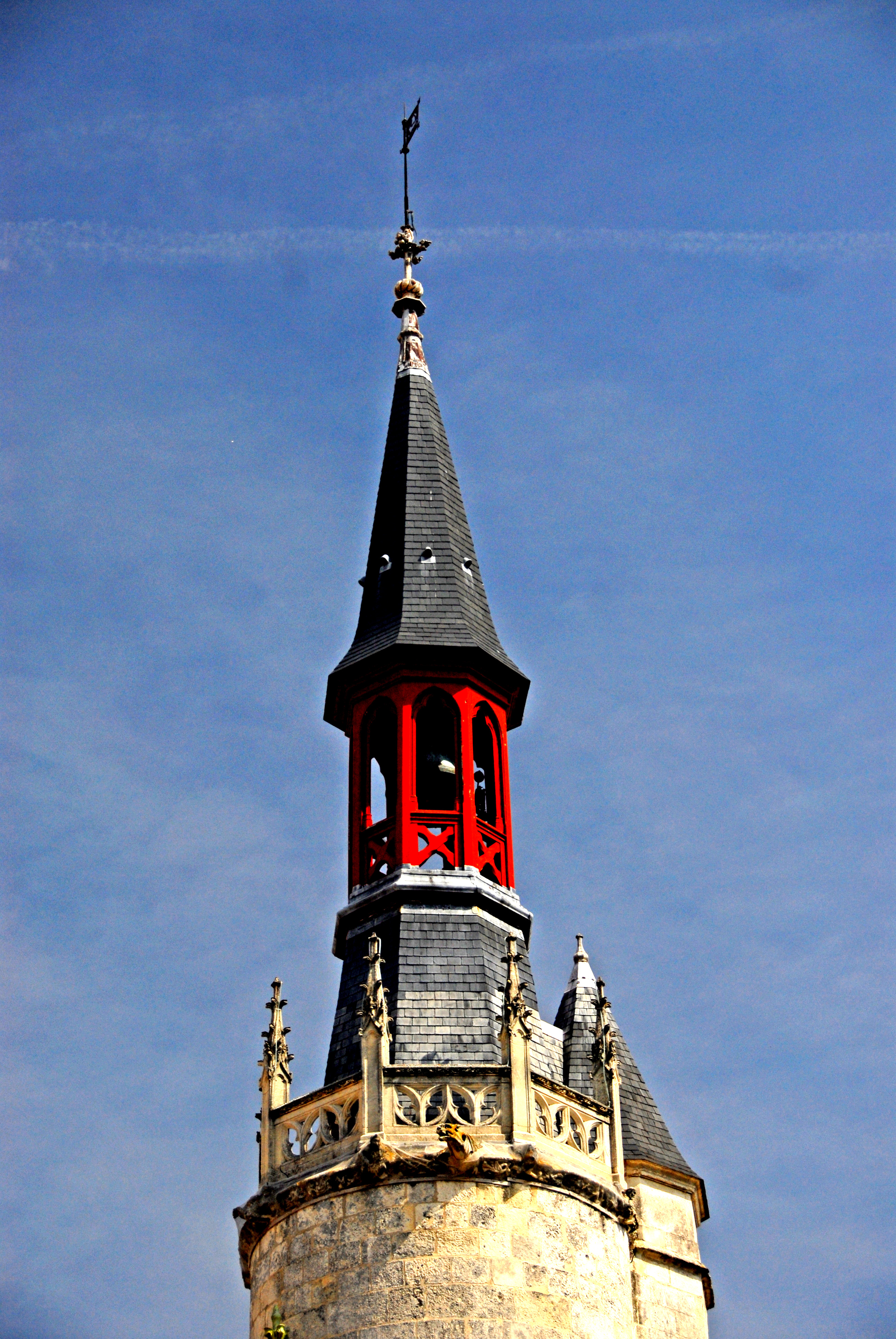 La Rochelle, Belfried, Turmspitze